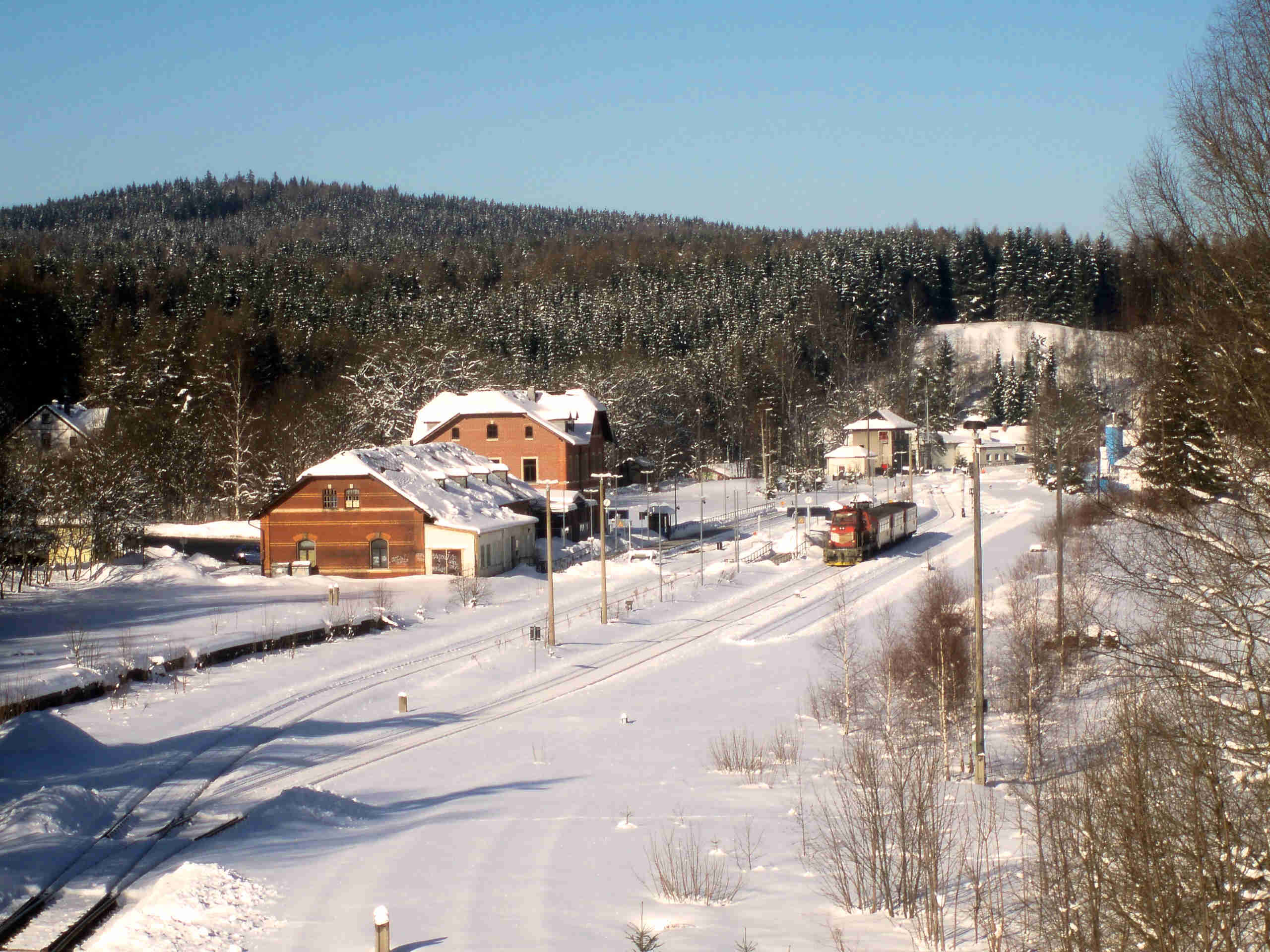 Bahnhof Johanngeorgenstadt mit abfahrbereitem Zug nach Karlsbad